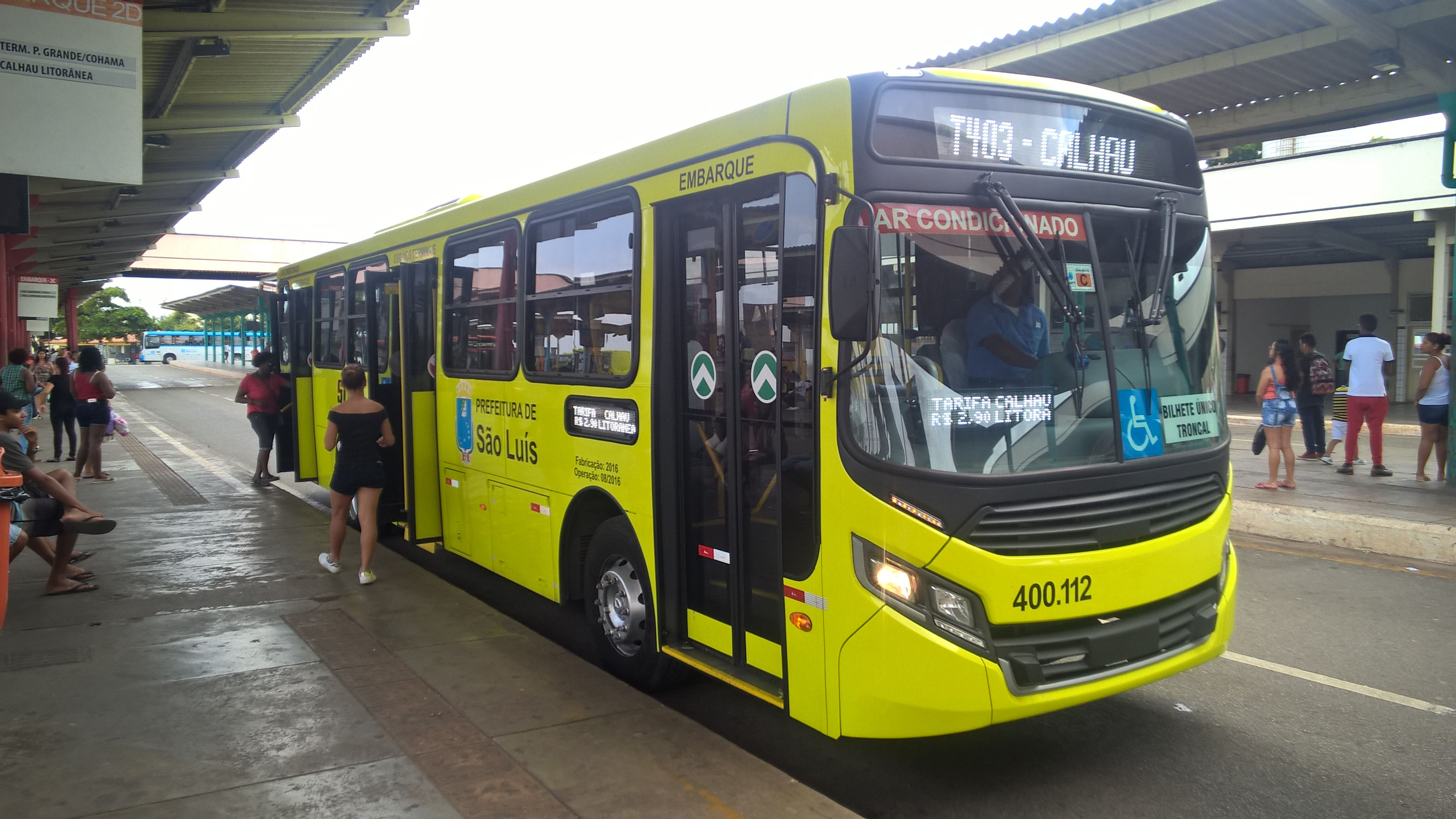 Carro nº 400-112 da Viação Primor, empresa que atua no Sistema Integrado de Transporte de São Luís, MA - Brasil